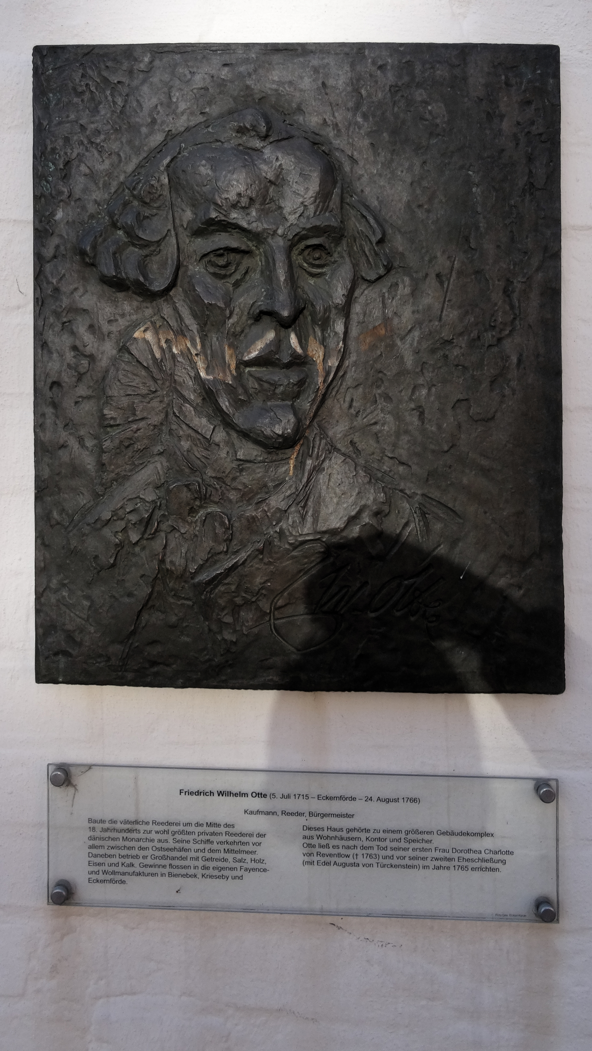 Relief von Friedrich Wilhelm Otte am Wohnhaus, Kieler Str.2, Eckernförde